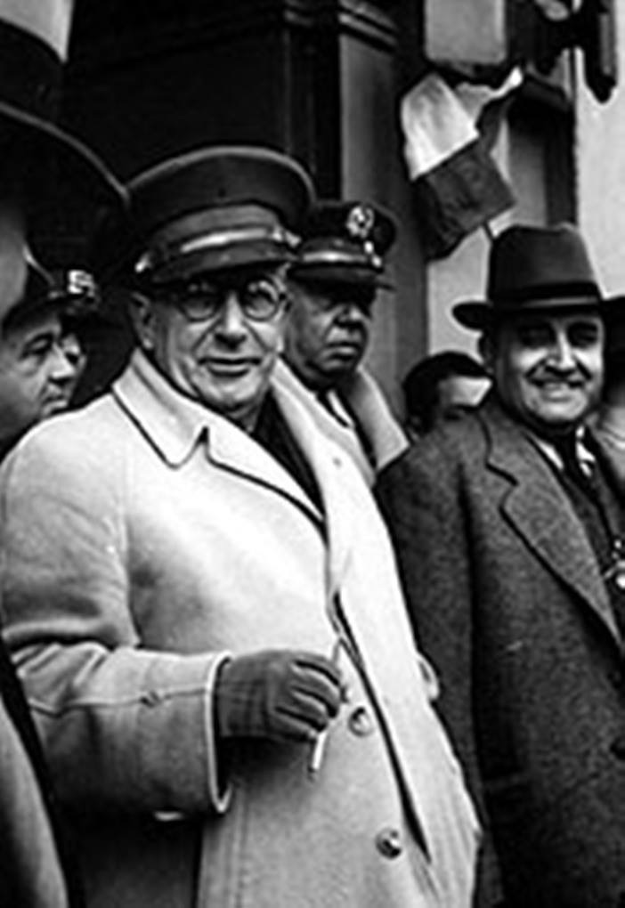 General Jorge Ubico y el coronel Roderico Anzueto Valencia.